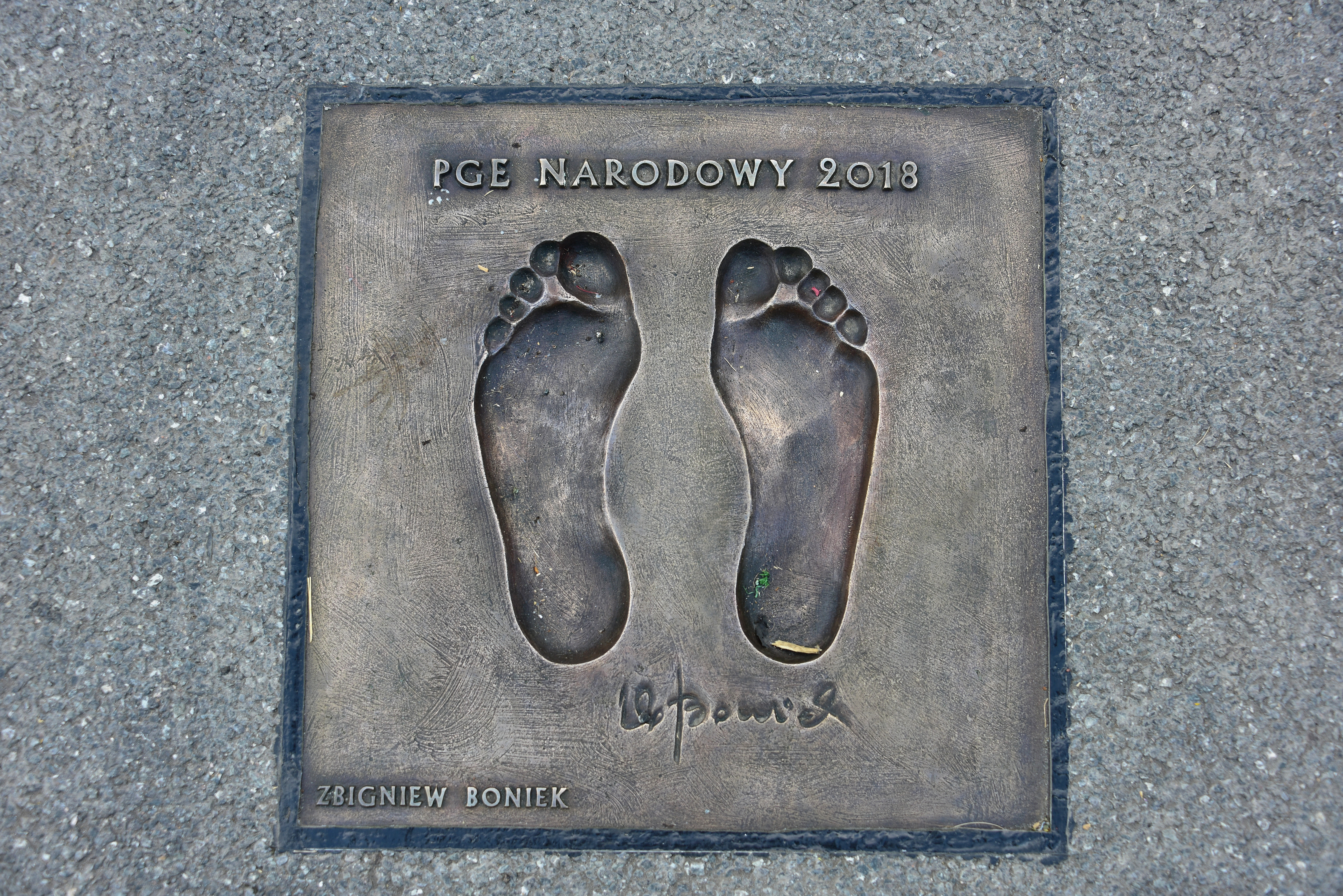 Aleja Gwiazd Piłki Nożnej na promenadzie Stadionu Narodowego w Warszawie. Wmurowana tablica z odciskami stóp Zbigniewa Bońka